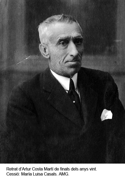 Artur Costa, anys 20